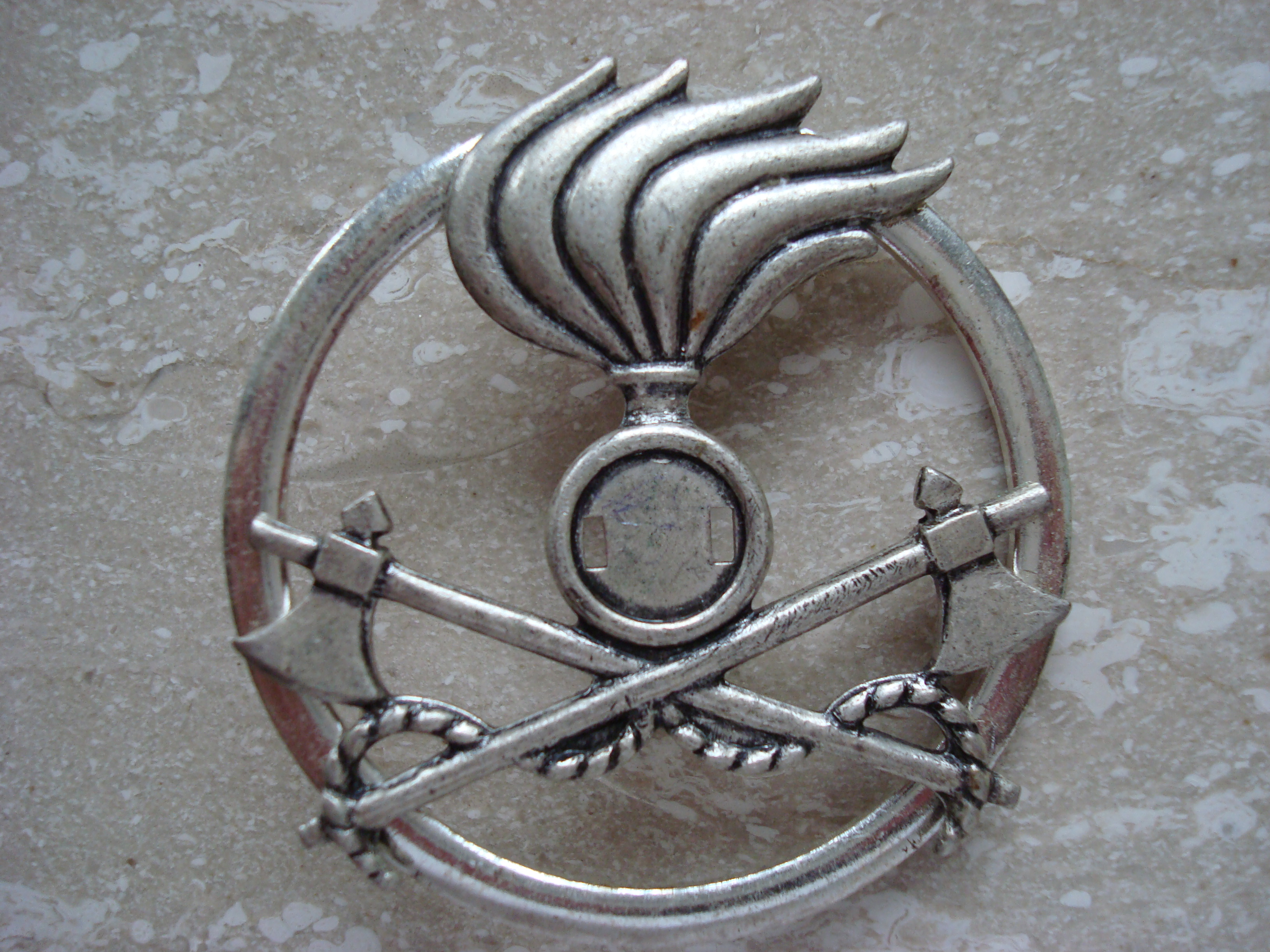 Fregio da Basco del Genio Pionieri